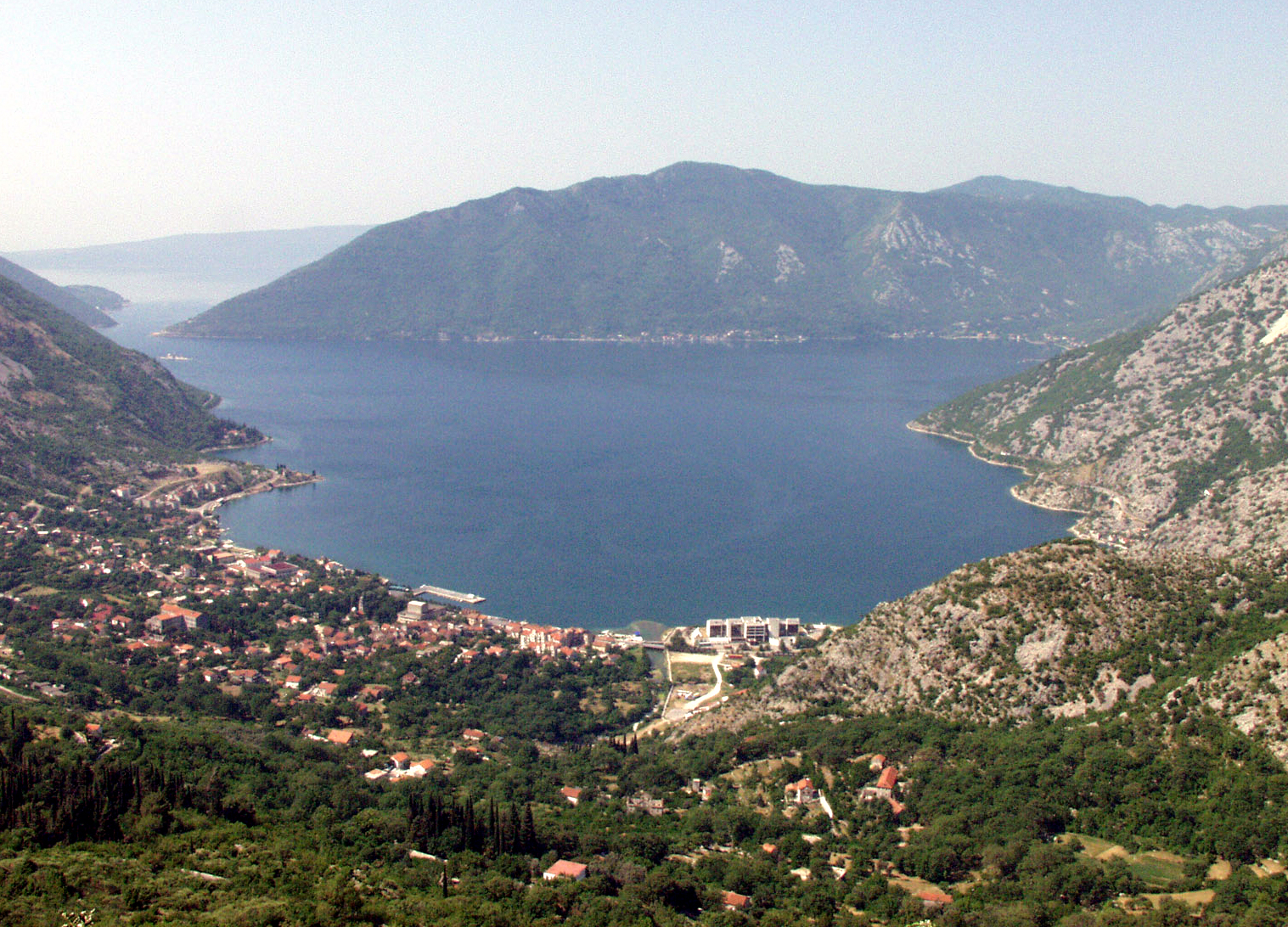 Risan, miasteczkow w Czarnogórze. Panorama, widok na zatoke.